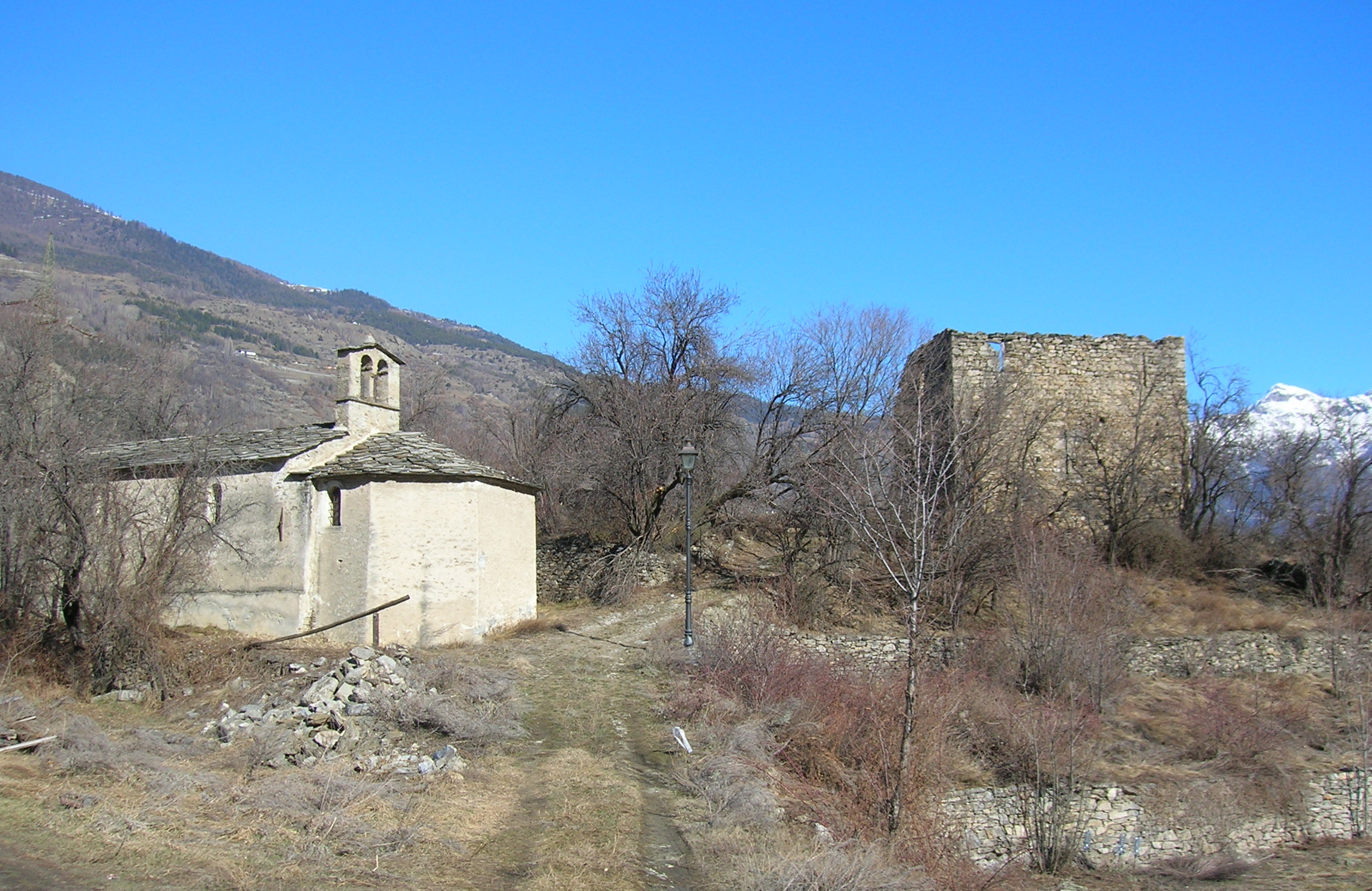 Torre dei Salassi e chiesa in inverno a Jovençan, Valle d'Aosta, Italia.